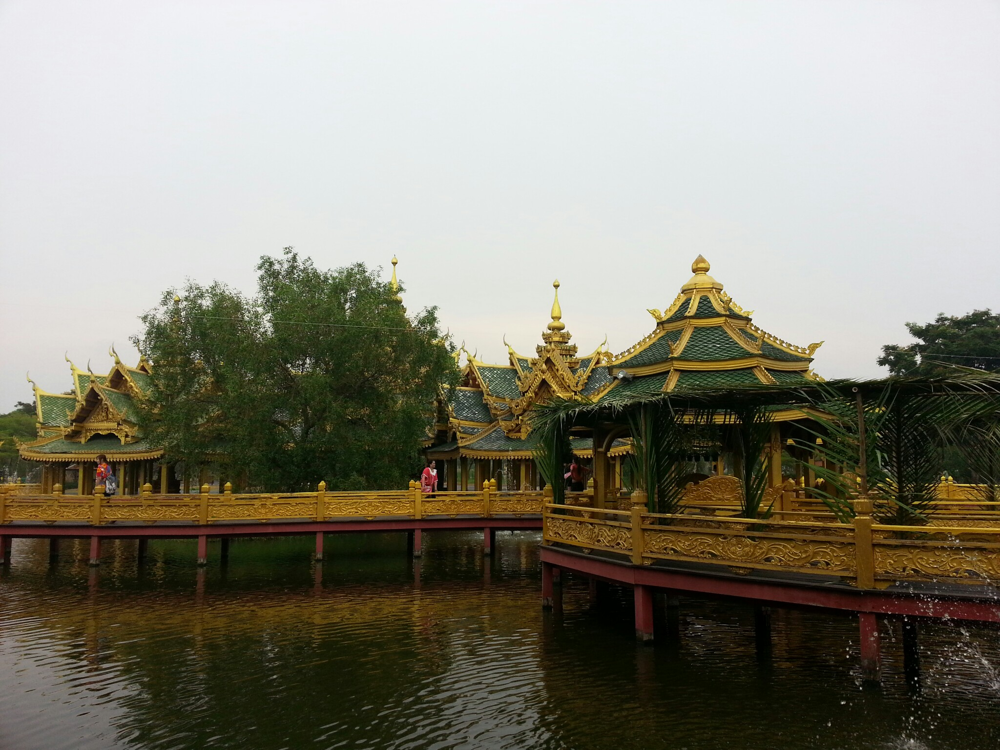 Phraeksa, Mueang Samut Prakan District, Samut Prakan 10280, Thailand